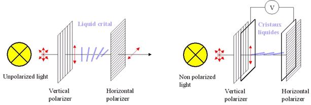 Polarització d'un lcd